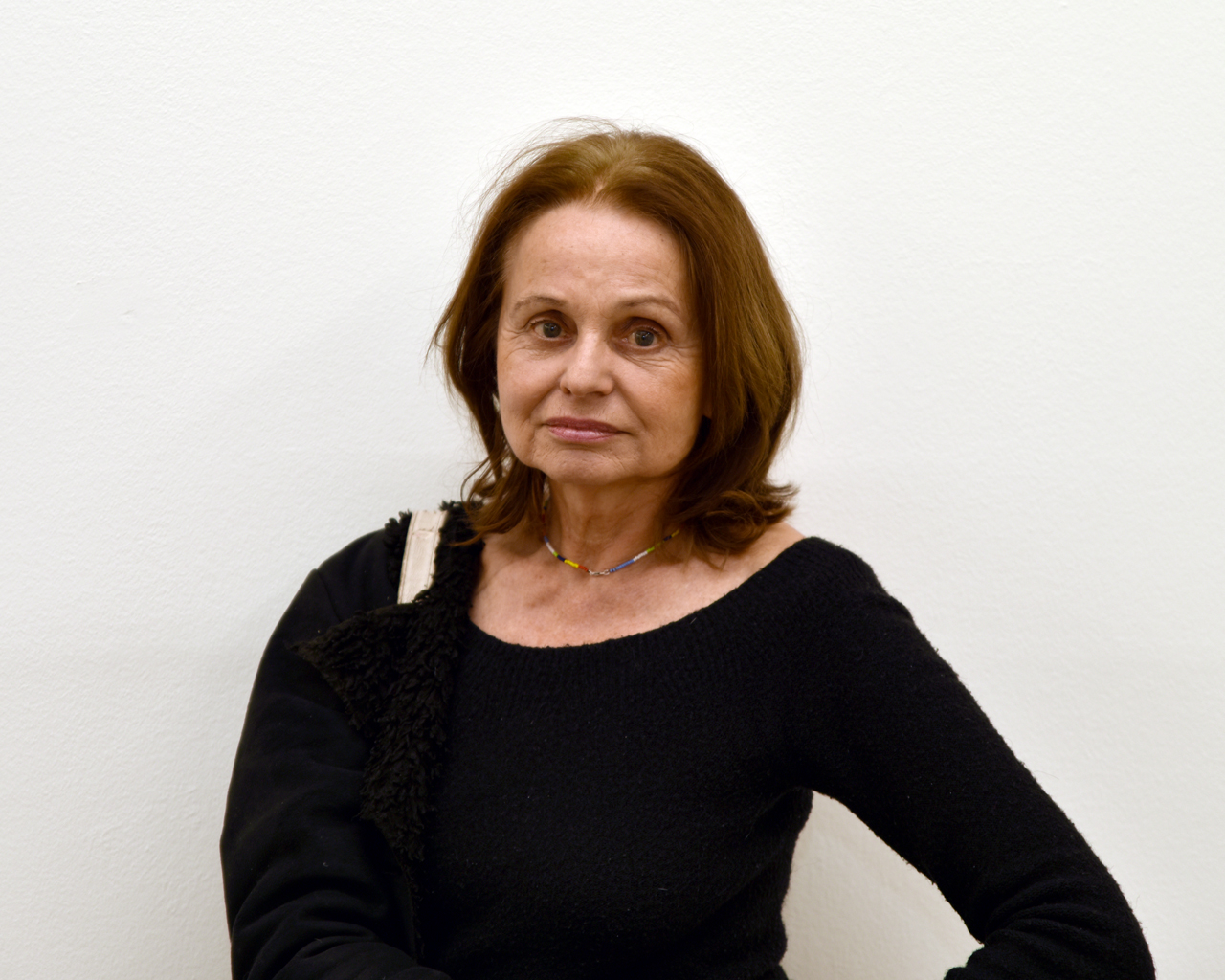 Jindra Viková (2020)